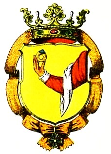 Persönliches Schwarzer-Adler-Ordenswappen (seit 4. Februar 1744) des preußischen Generalfeldmarschalls Johann von Lehwaldt (* 24. Juni 1685 in Legitten, Landkreis Labiau; † 16. November 1768 in Königsberg), seit 4. Februar 1744 Ritter des Ordens vom Schwarzen Adler